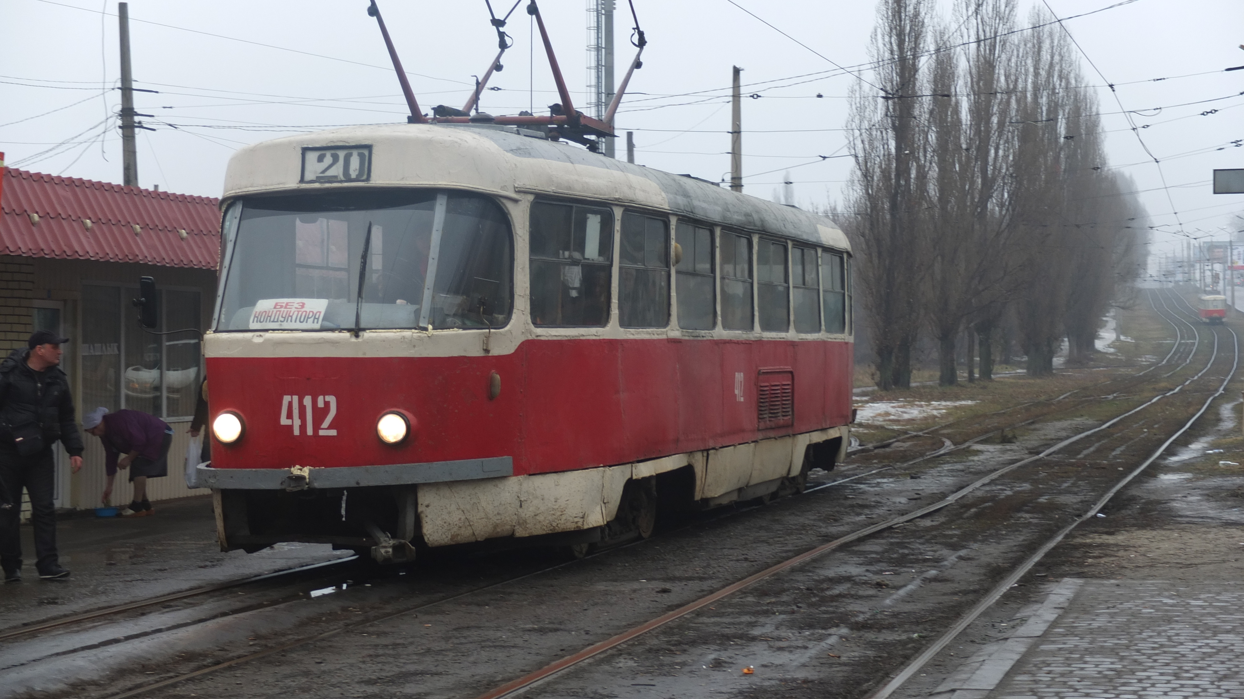 Tramway de Kharkov